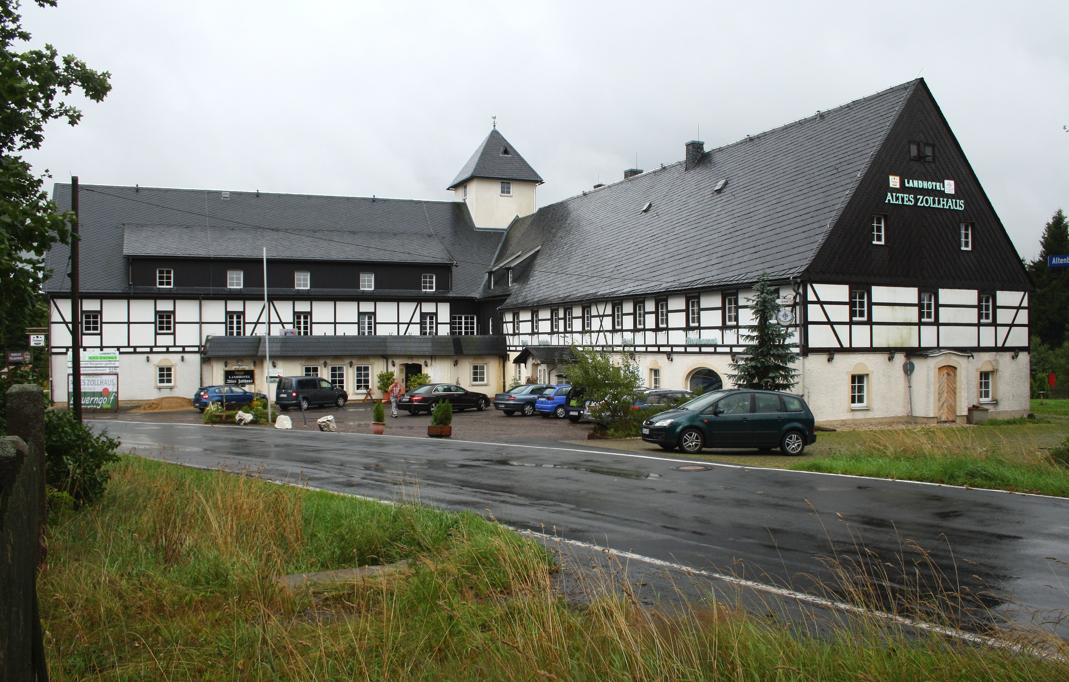 Altes Zollhaus in Neuhermsdorf, Osterzgebirge.